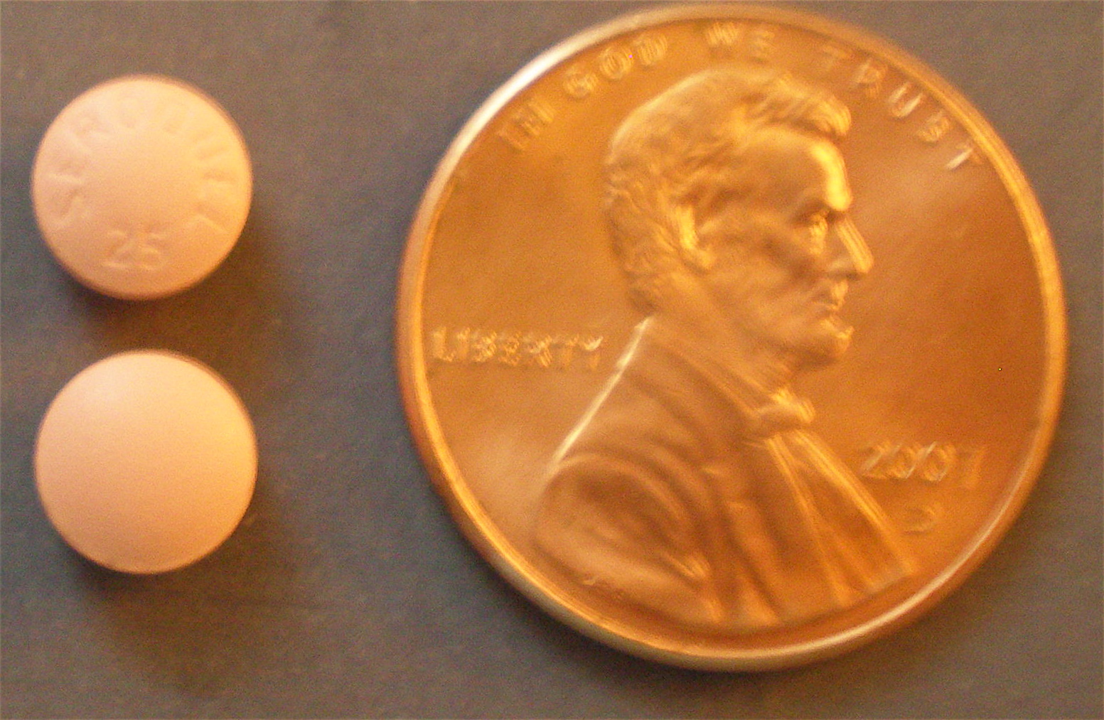 Seroquel (Quetiapine) 25 mg Tablet.